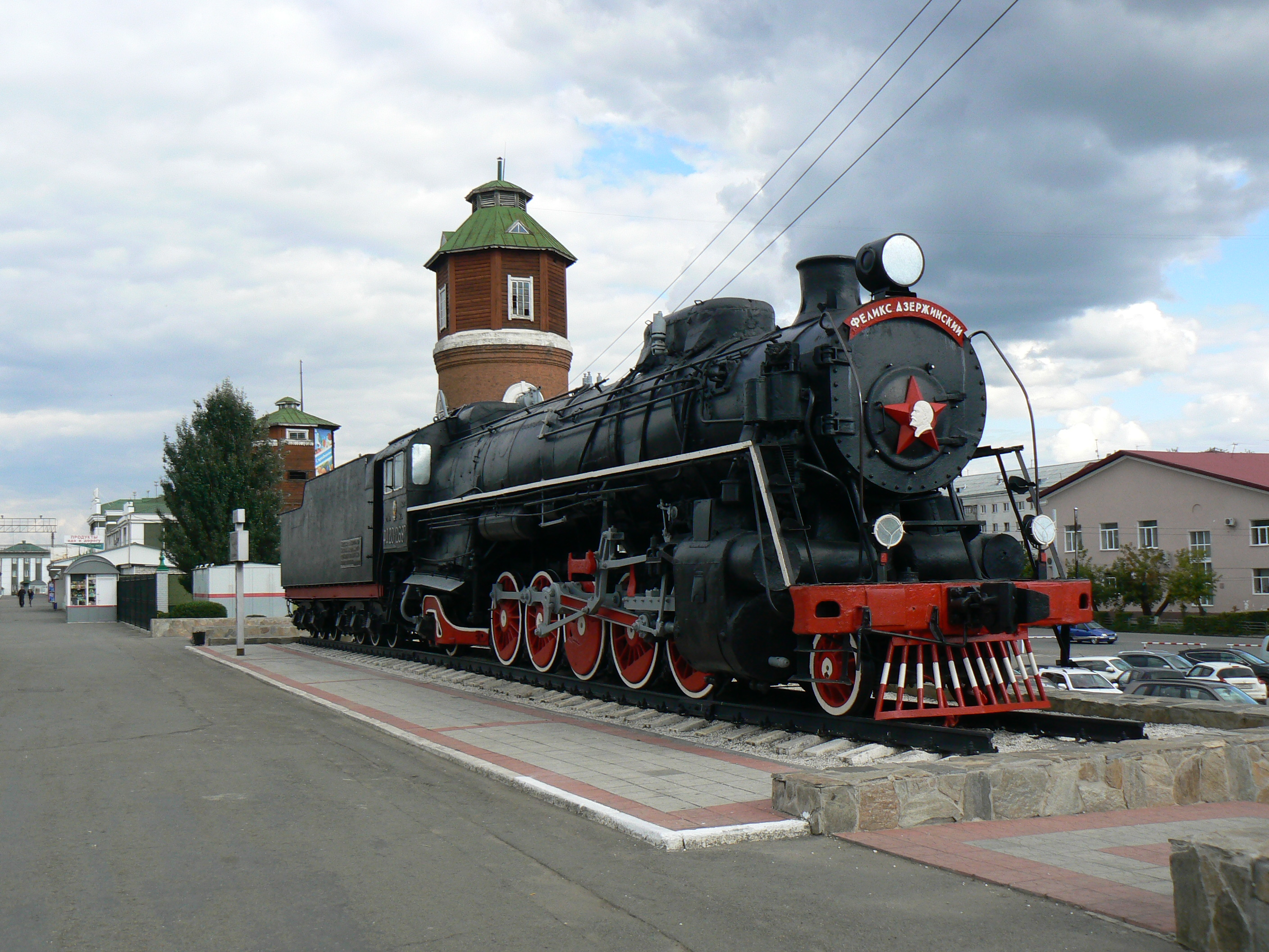 Паровоз-памятник ФД20-2697, установленный в г. Курган, железнодорожный вокзал.